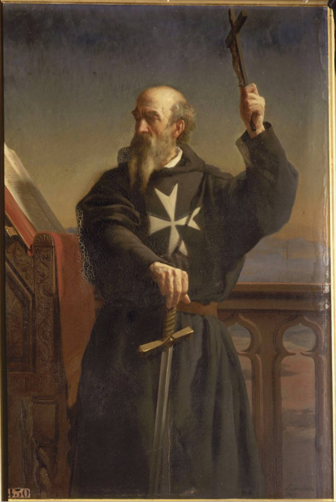 toile de 1842, peinture à l'huile d' Alexandre Laemlein (1813-1871), commandé par Louis-Philippe pour le musée historique de Versailles